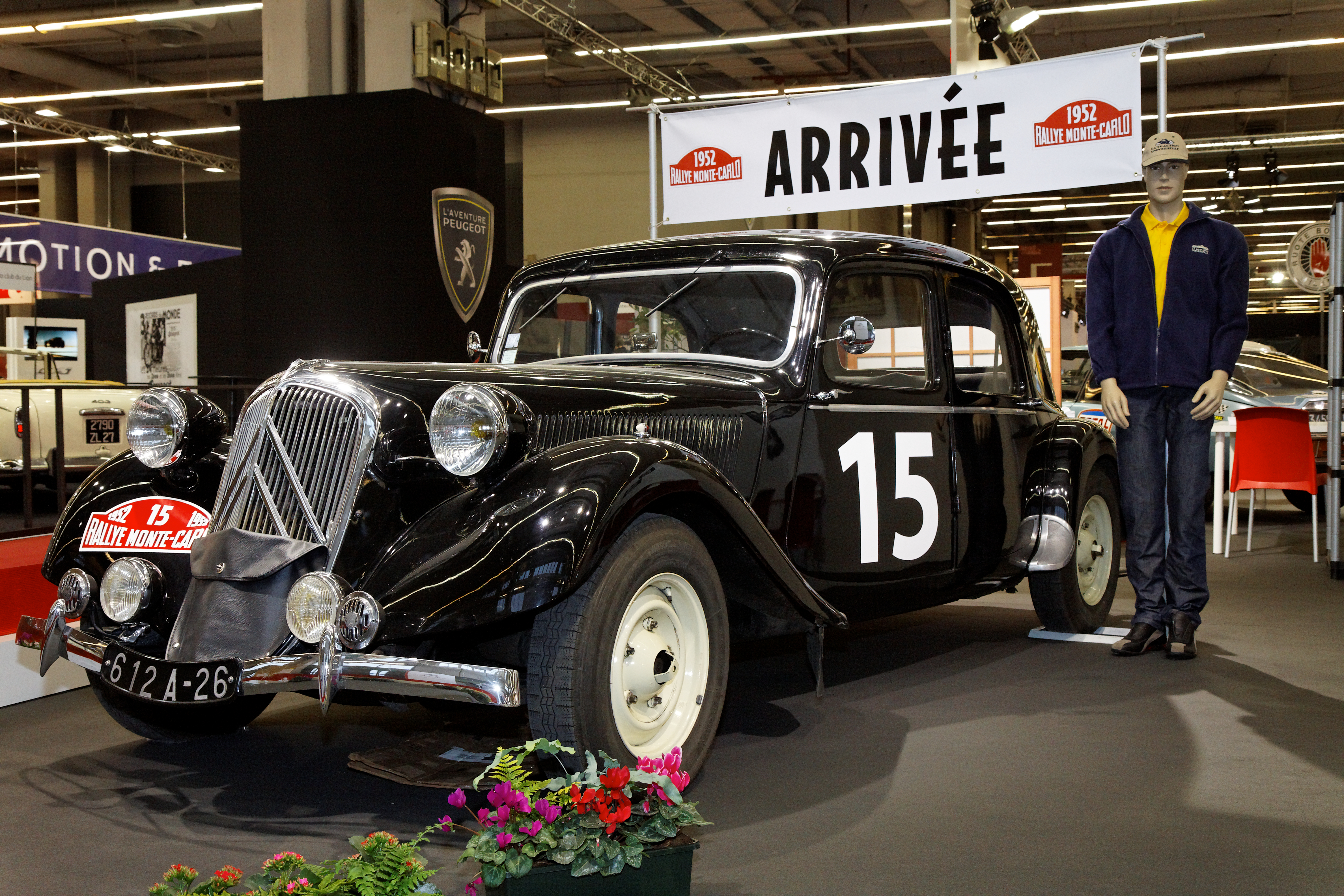 Photographie prise lors du salon rétromobile 2011 à Paris, porte de Versailles.